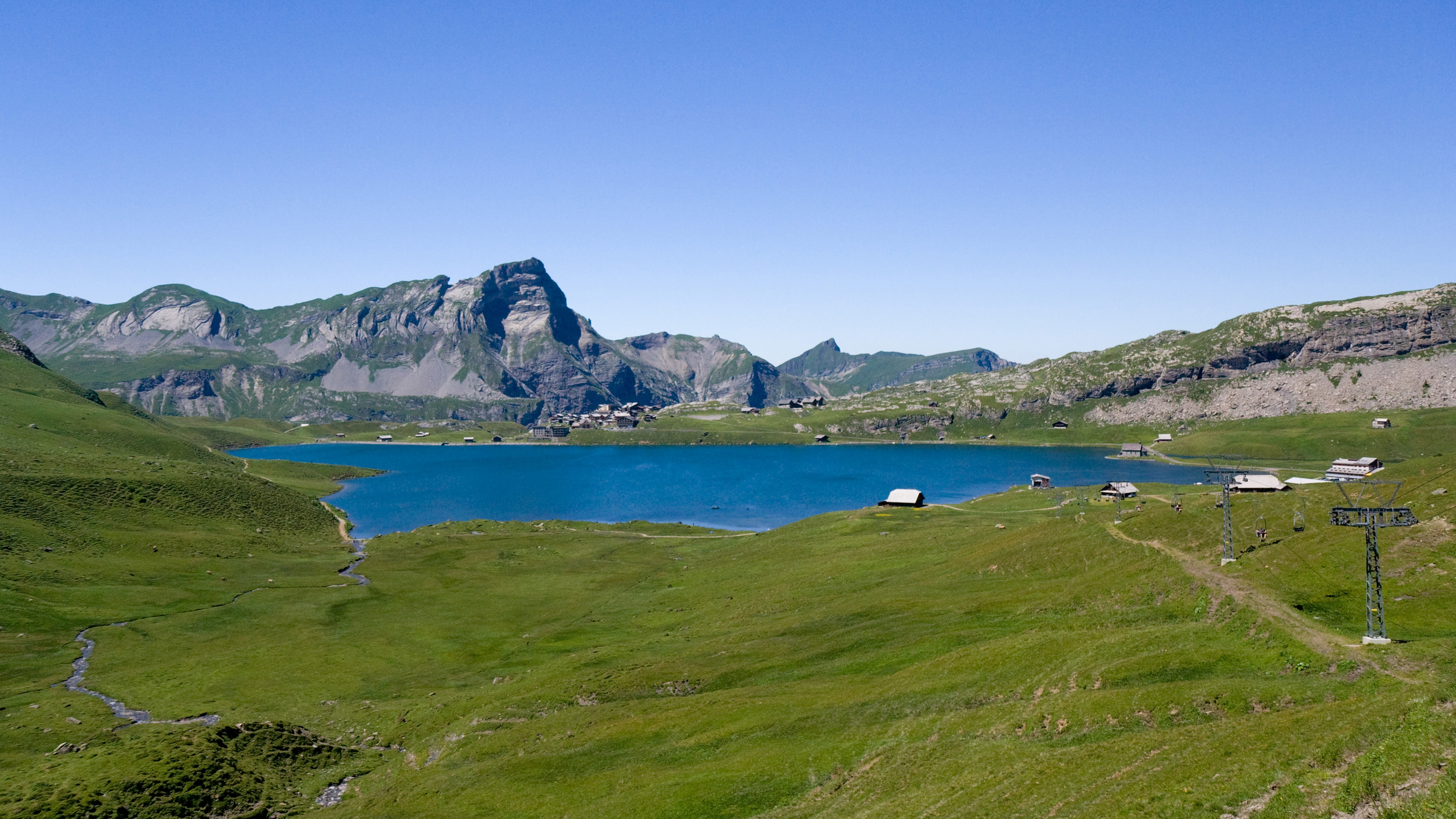 Der Melchsee ob Sachseln